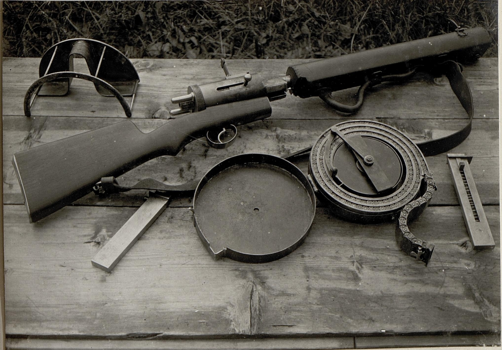 Maschinengewehr des Standschützen Hellriegel.